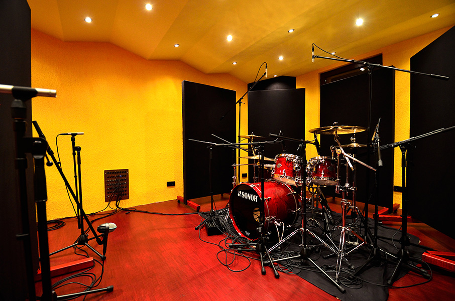 Bastard Studios Tonstudio - Drumrecording im großen Aufnahmeraum